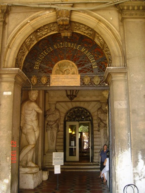 Ingresso della Biblioteca nazionale Marciana